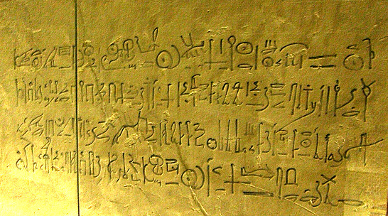 Inscription relatant une visite de contrôle dans la tombe Thoutmosis IV en l'an 8 d'Horemheb - Vallée des Rois.